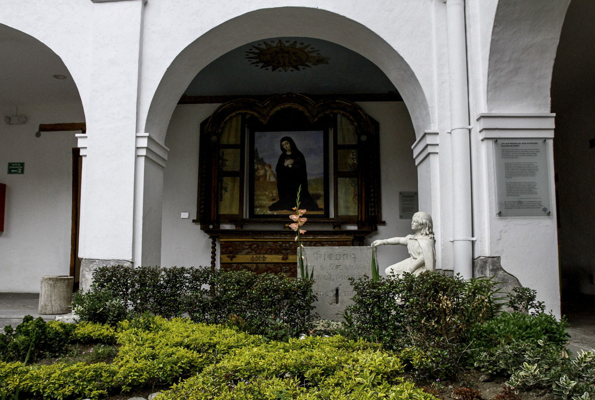 Quito, Ecuador, 20 dic (ANDES).- Quito Turismo realizó la ruta turística para conocer los secretos que esconden los Monasterios de Quito. La ruta revelas las leyendas y tradiciones detrás de San Francisco, El Carmen Alto y Santo Domingo. Foto: Micaela Ayala V./ANDES